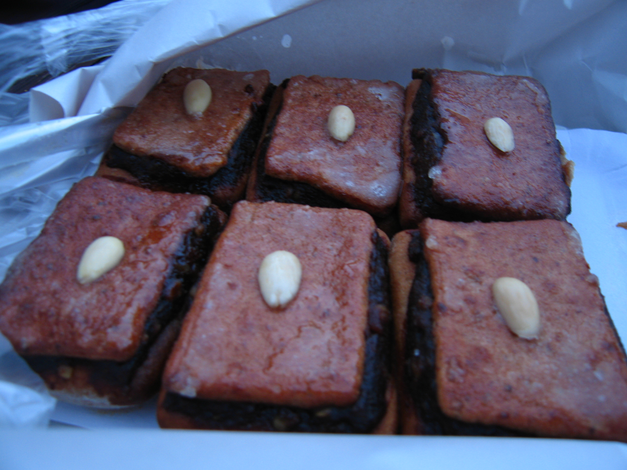 Miletínské modlitbičky